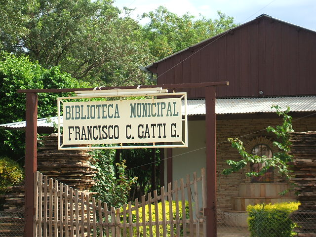 Biblioteca